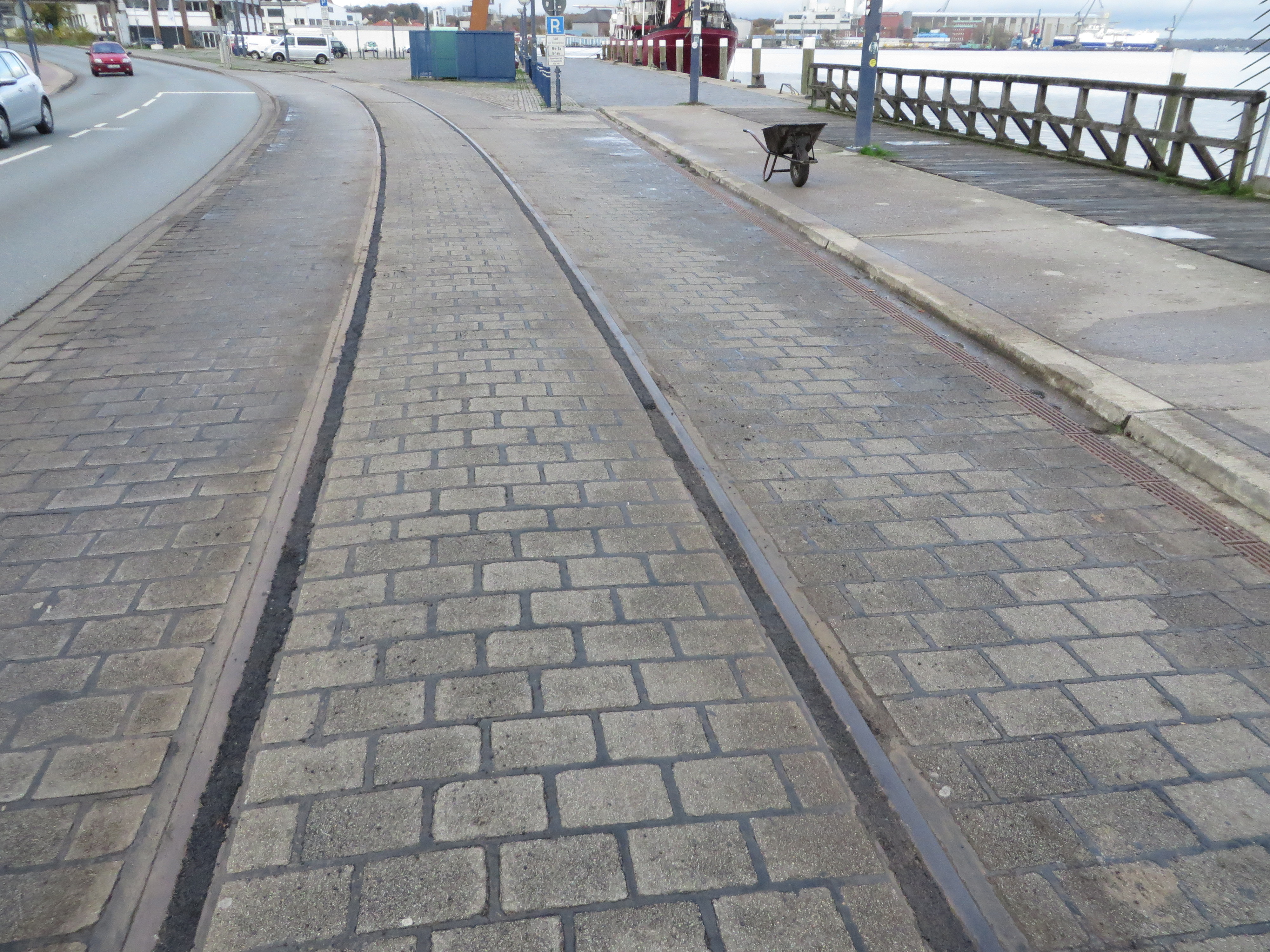 Flensburger Hafenbahn, durch Asphaltierung am 6. Nov unbrauchbar gemachte Schienen am Westufer, Bild 03